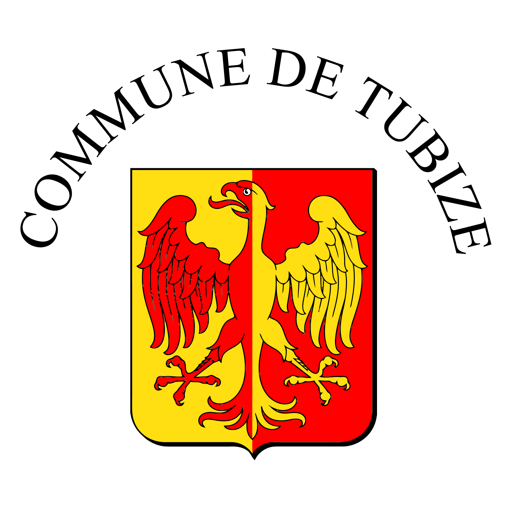 Armoirie de l'Administration Communale de Tubize